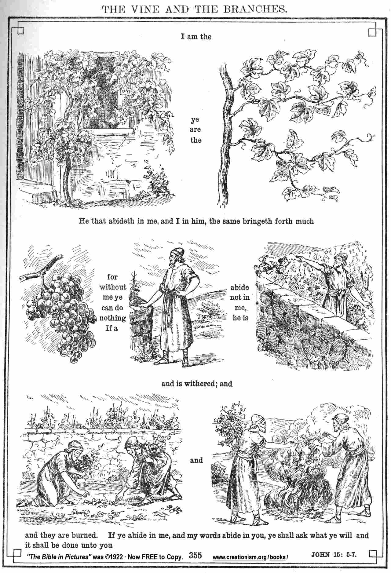 parabalr picture